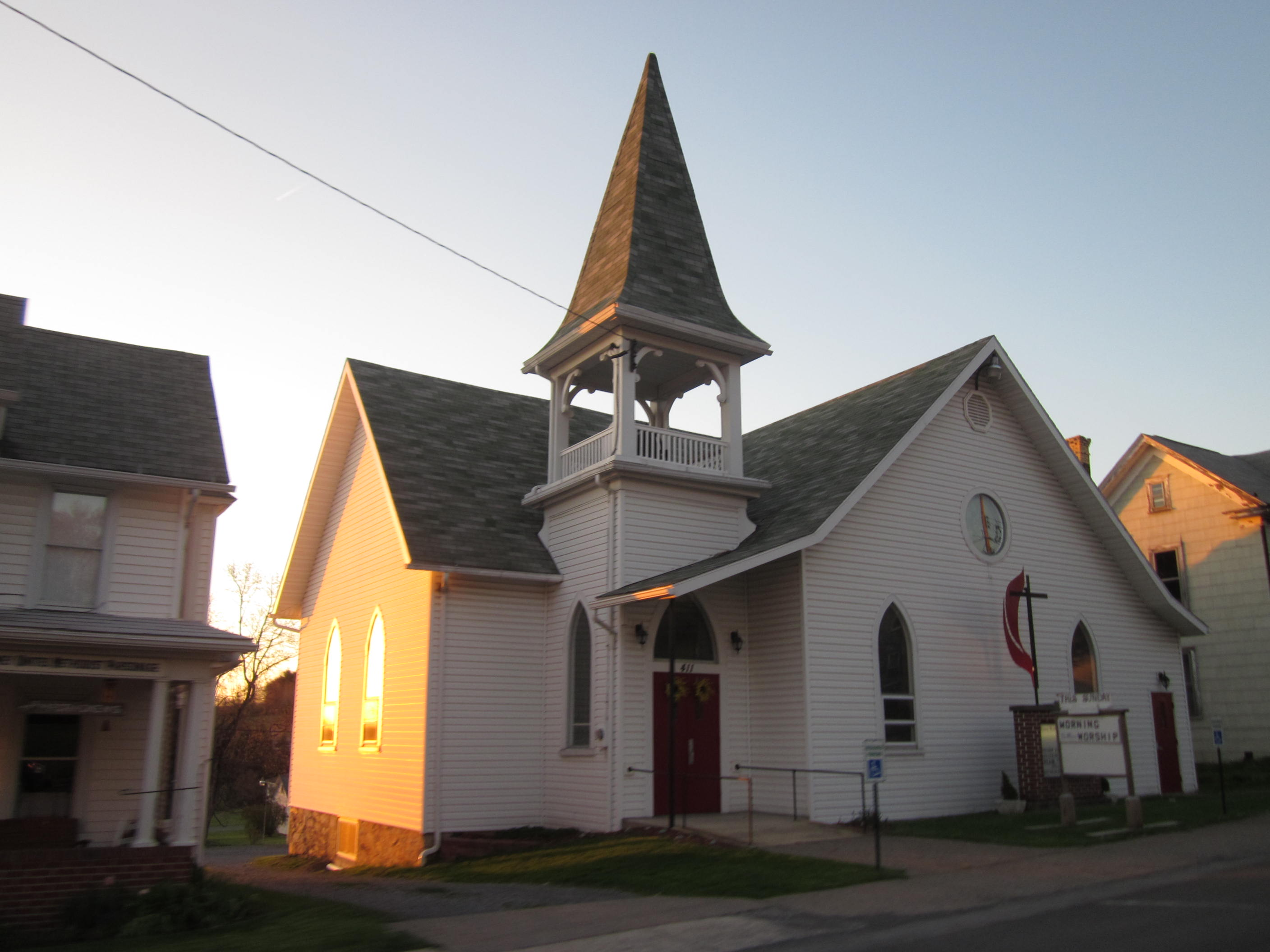 Ramey, Pennsylvania